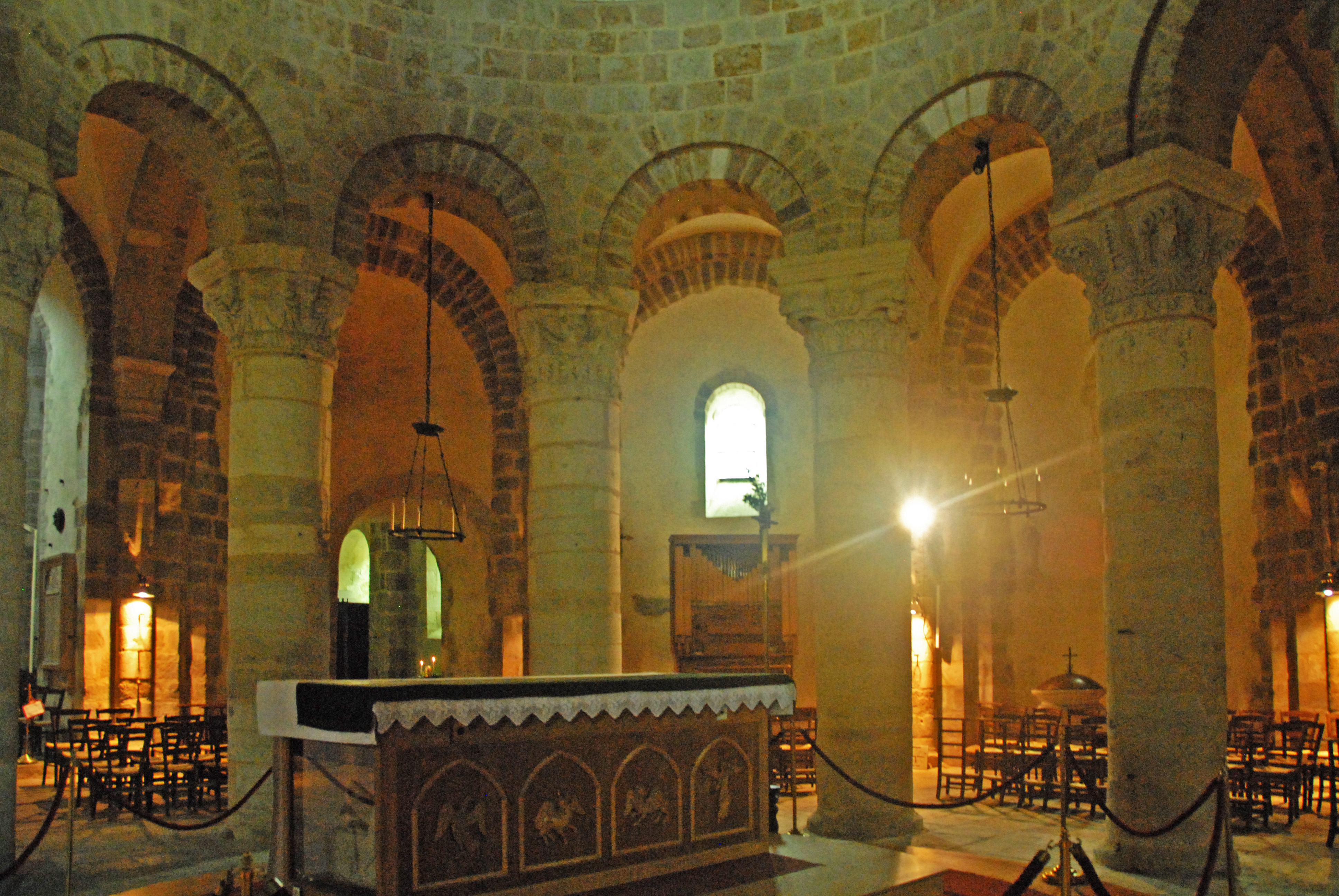 Neuvy_St.-Sépulcre, Rotunde, Altar im Arkadenkranz